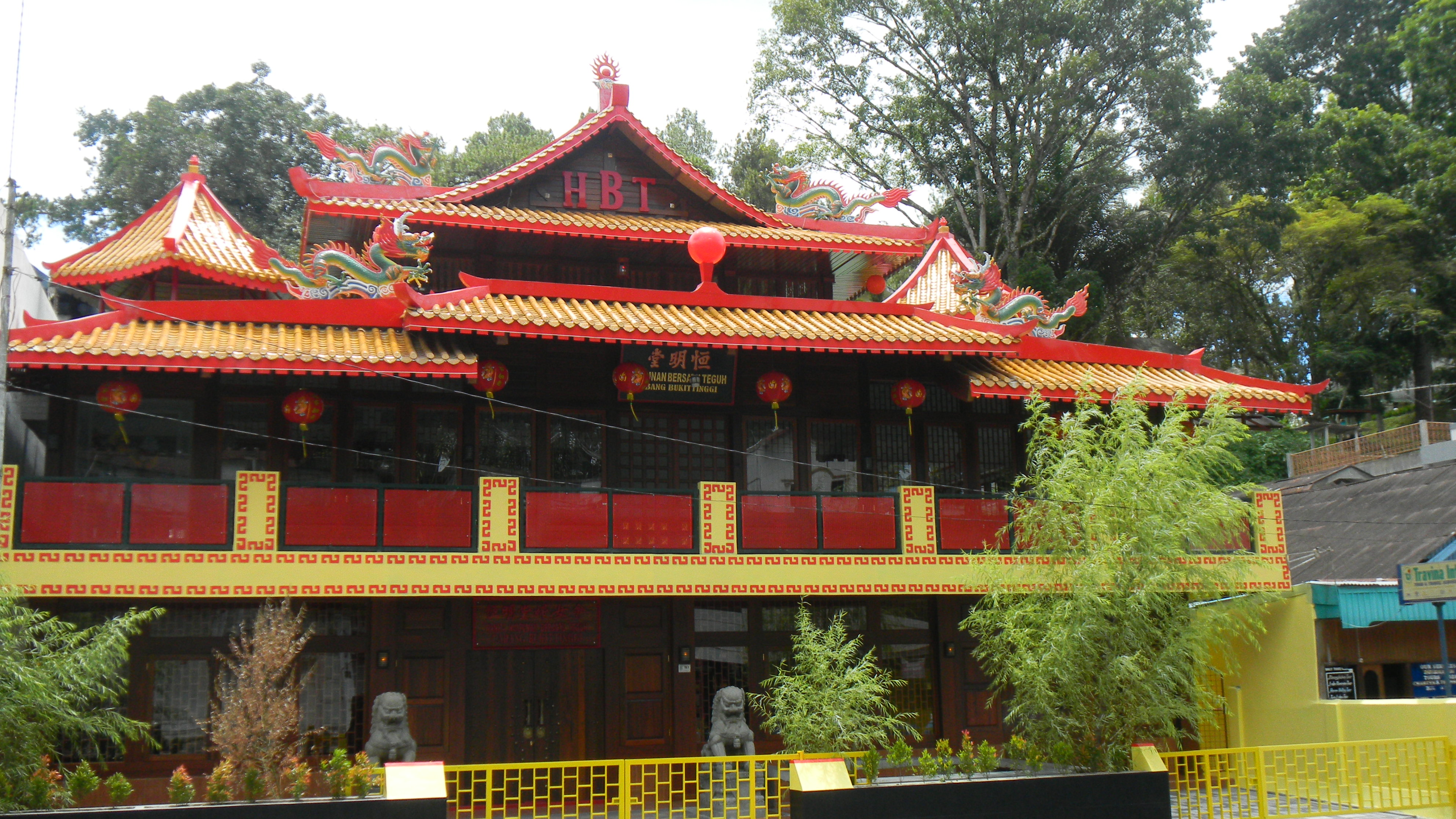 Gedung perkumpulan Himpunan Bersatu Teguh di kota Bukittinggi, Indonesia.